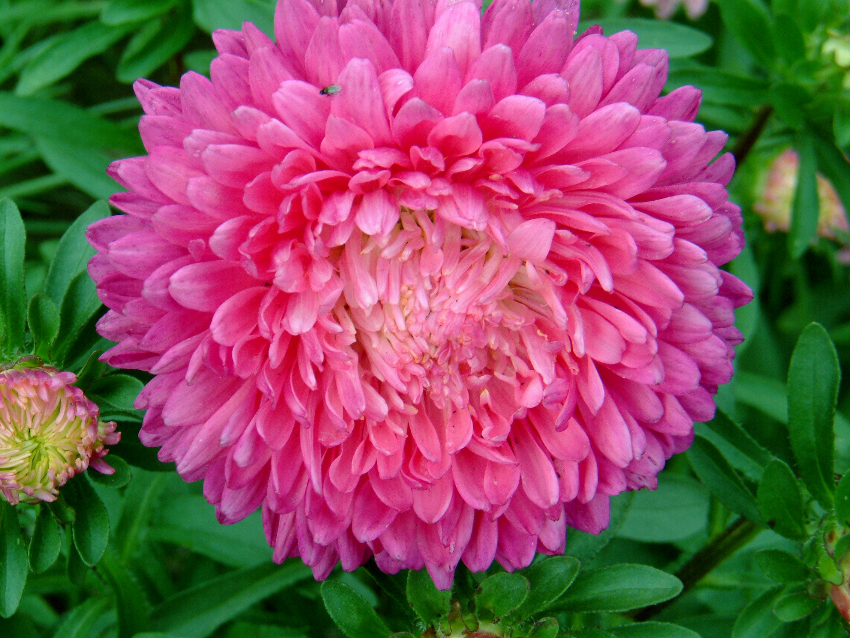 Callistephus chinensis Sommeraster 2 August 2007